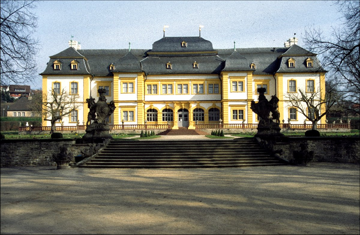 Veitshöchheim Gesamtansicht